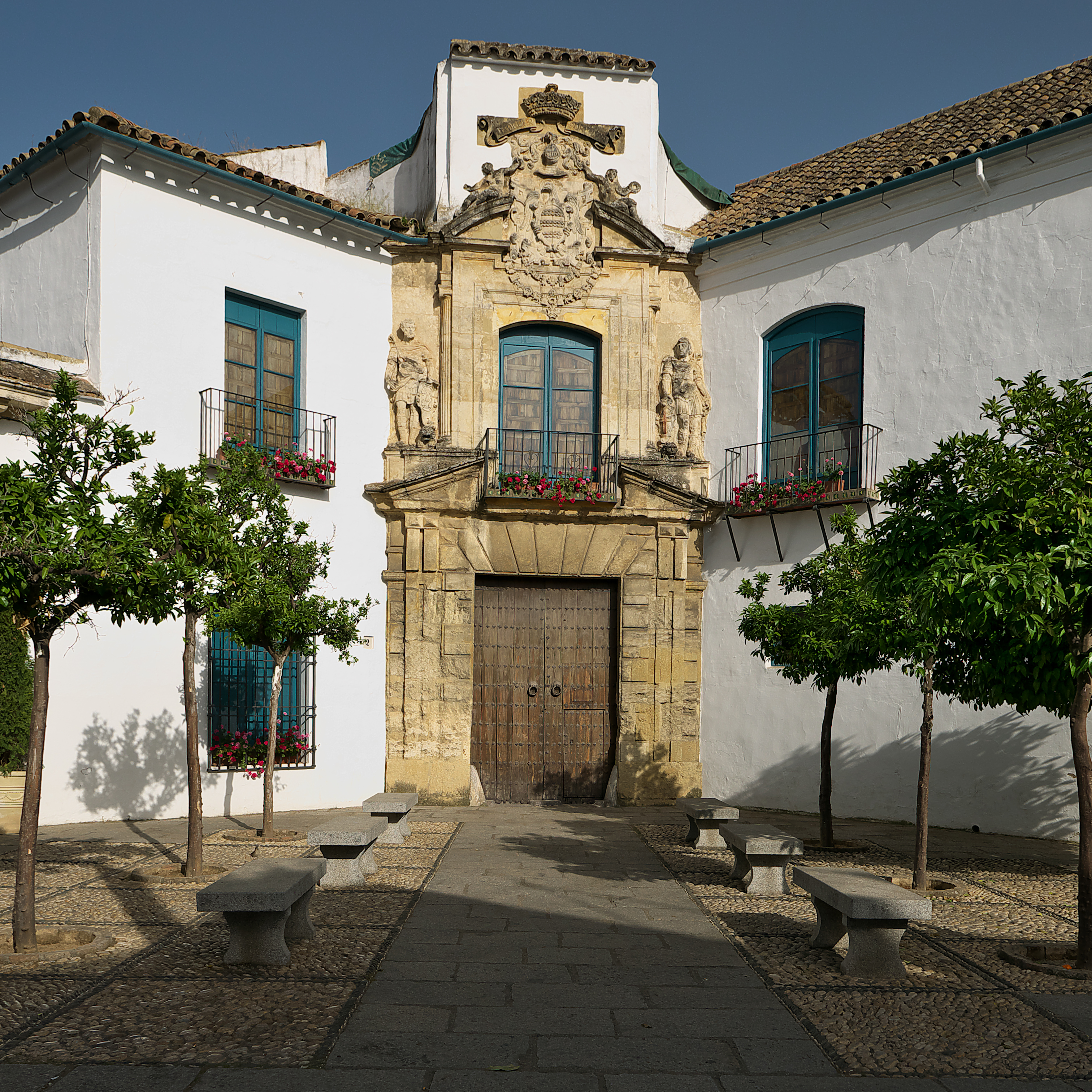 Portada principal del Palacio de Viana (Córdoba), atribuida a Juan de Ochoa (finales del XVI)